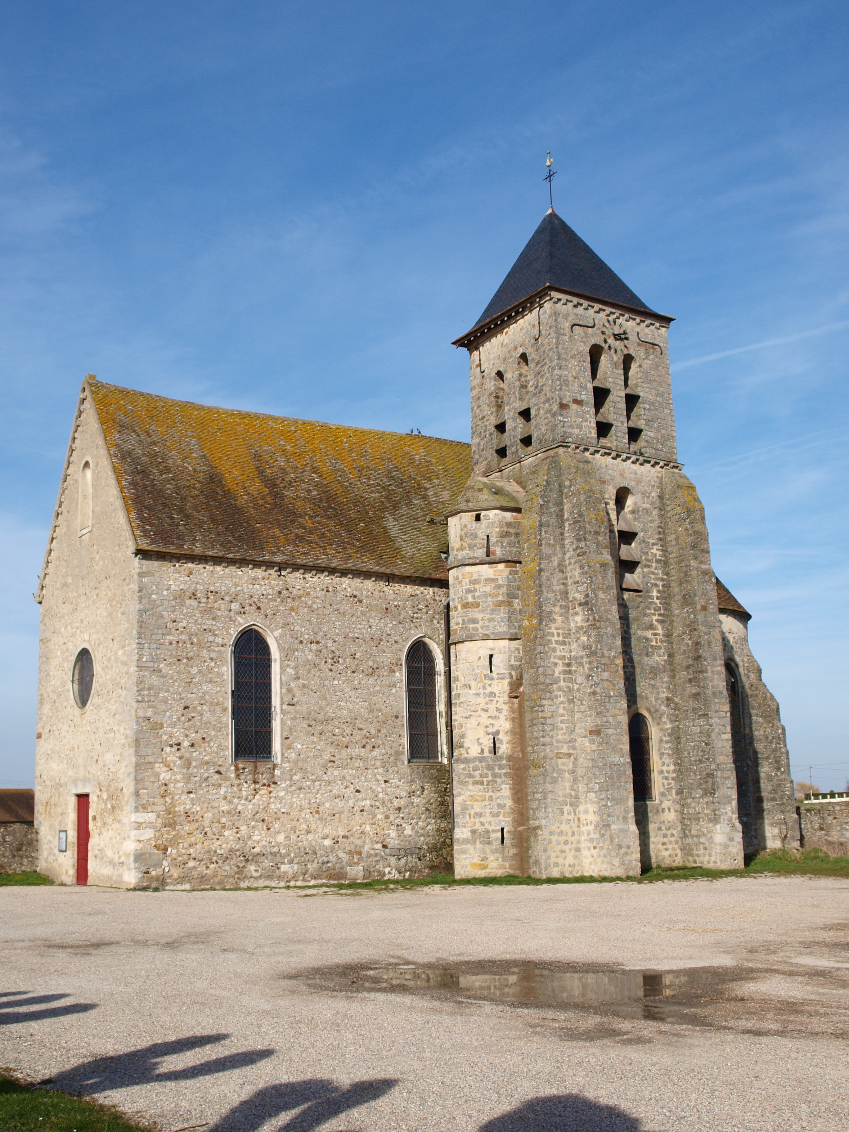 Église Notre-Dame de l'Assomption d'Esmans (Seine-et-Marne, France)